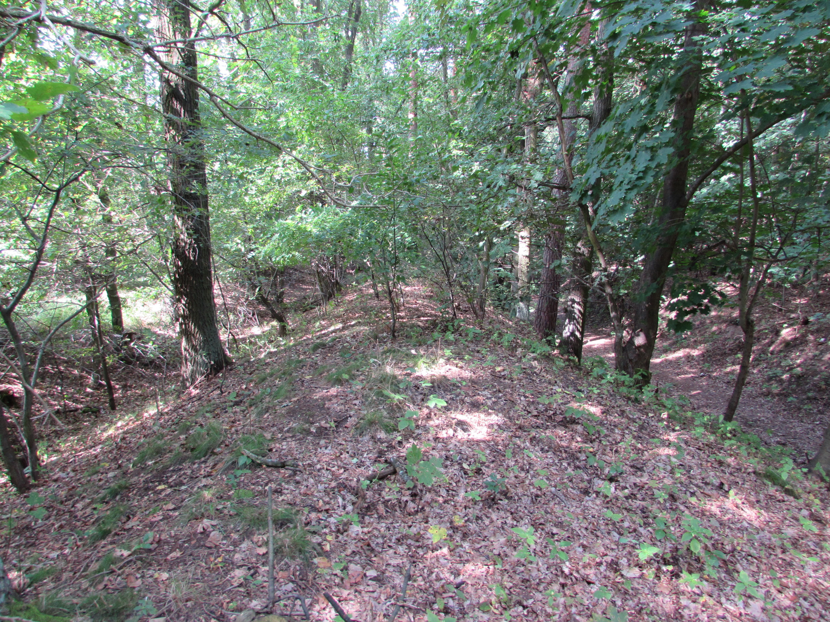 schwedenwälle bei bohnenland